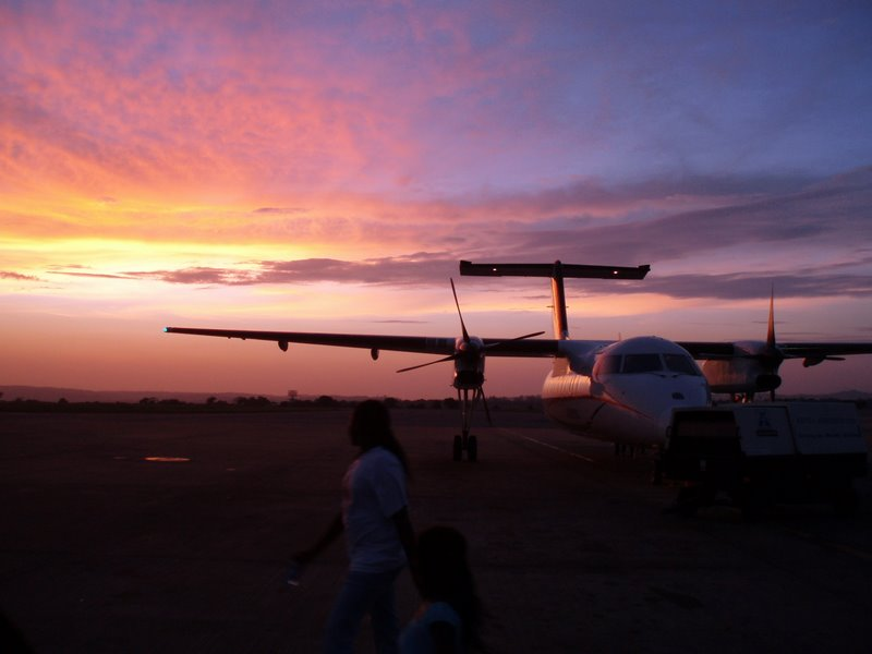 Sunset on arrival at Msa Airport (Moi Int'l Airport)